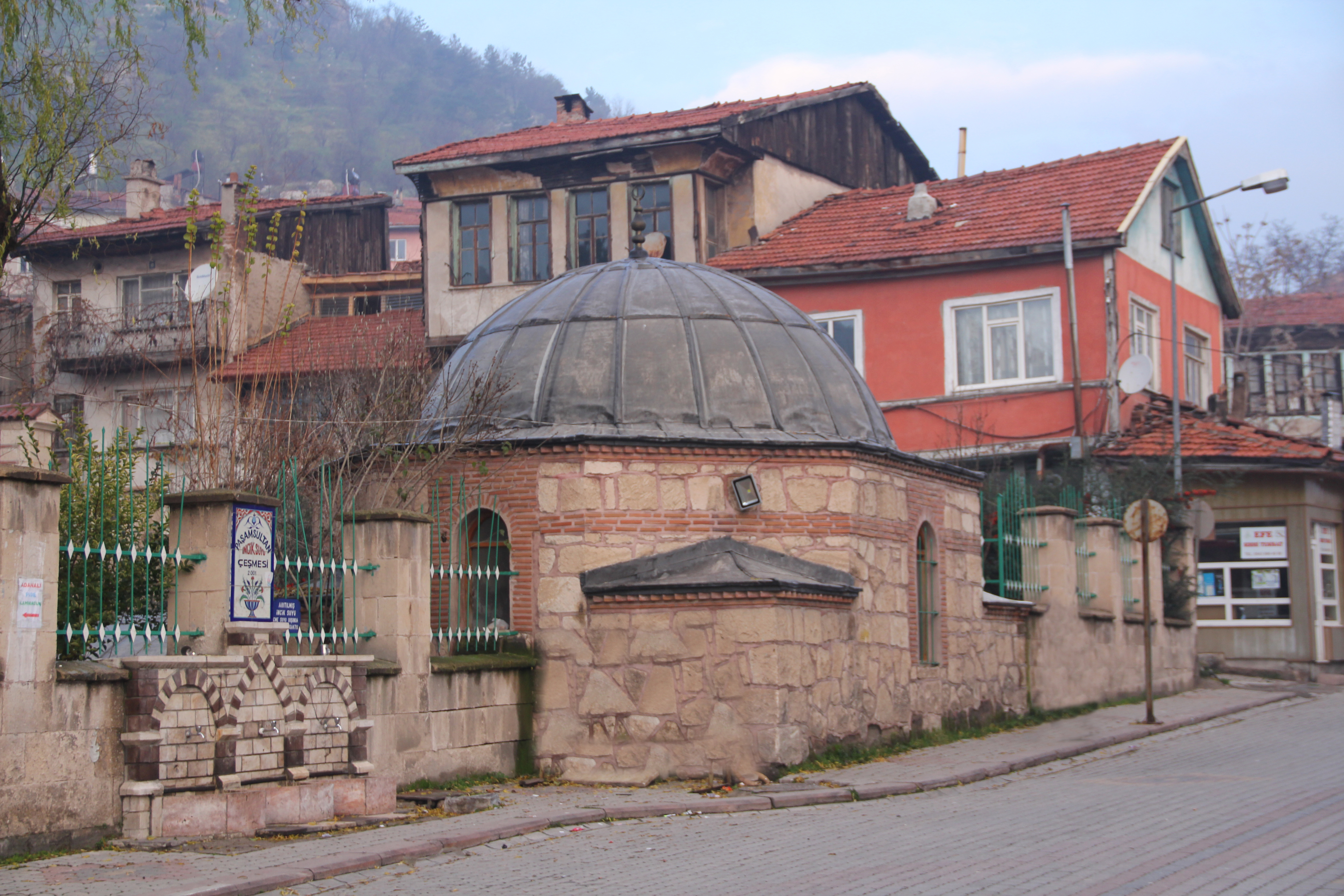 Paşam Sultan, Kütahya.